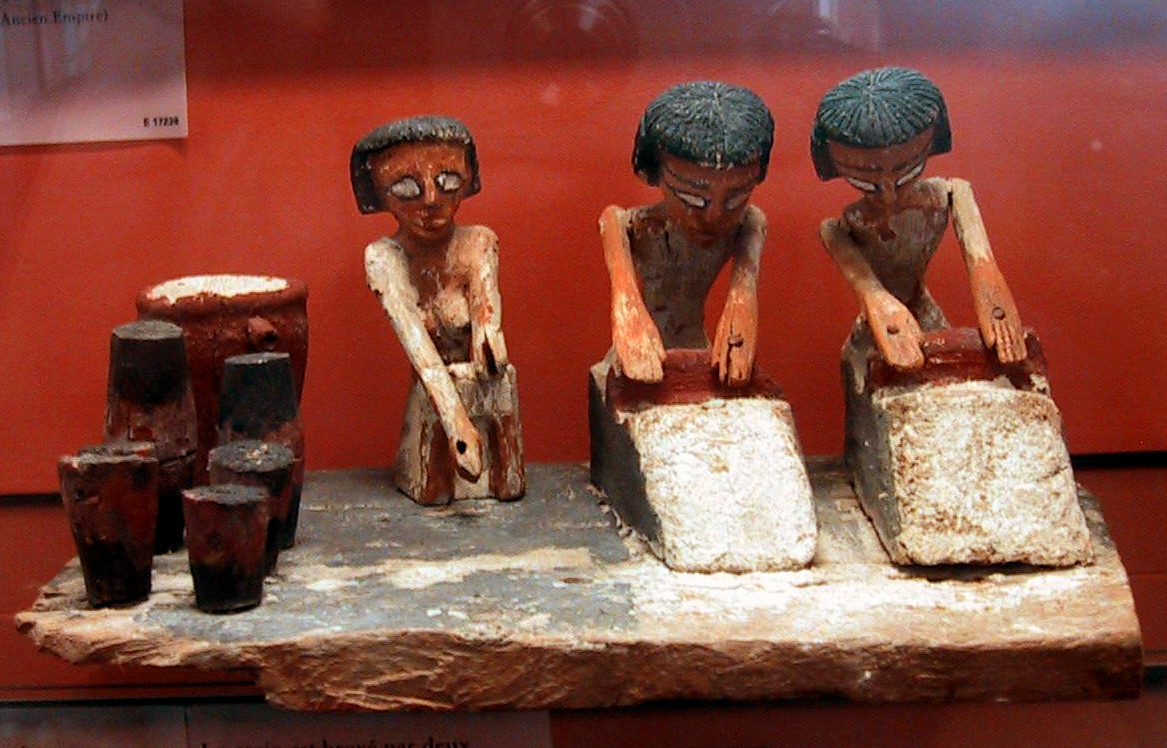 Scène de brasserie, Moyen Empire (2033 - 1710 Av. J.C.). Bois peint. Le grain est broyé par deux meuniers. A droite, la jarre à brasser et les petits vases à bière.